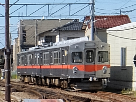 北陸鉄道 7000系